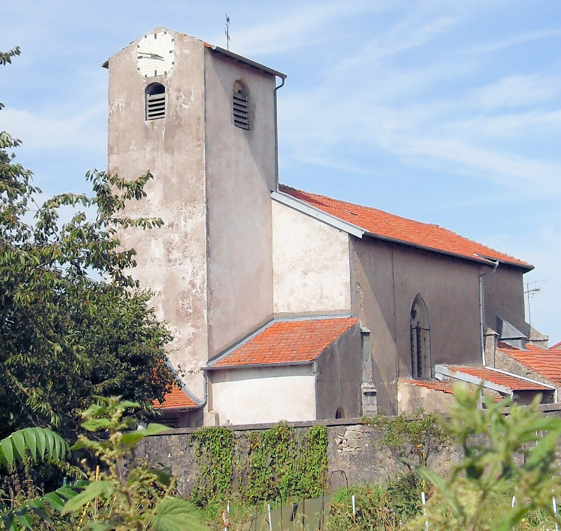 L'église Saint-Martin à Lebeuville